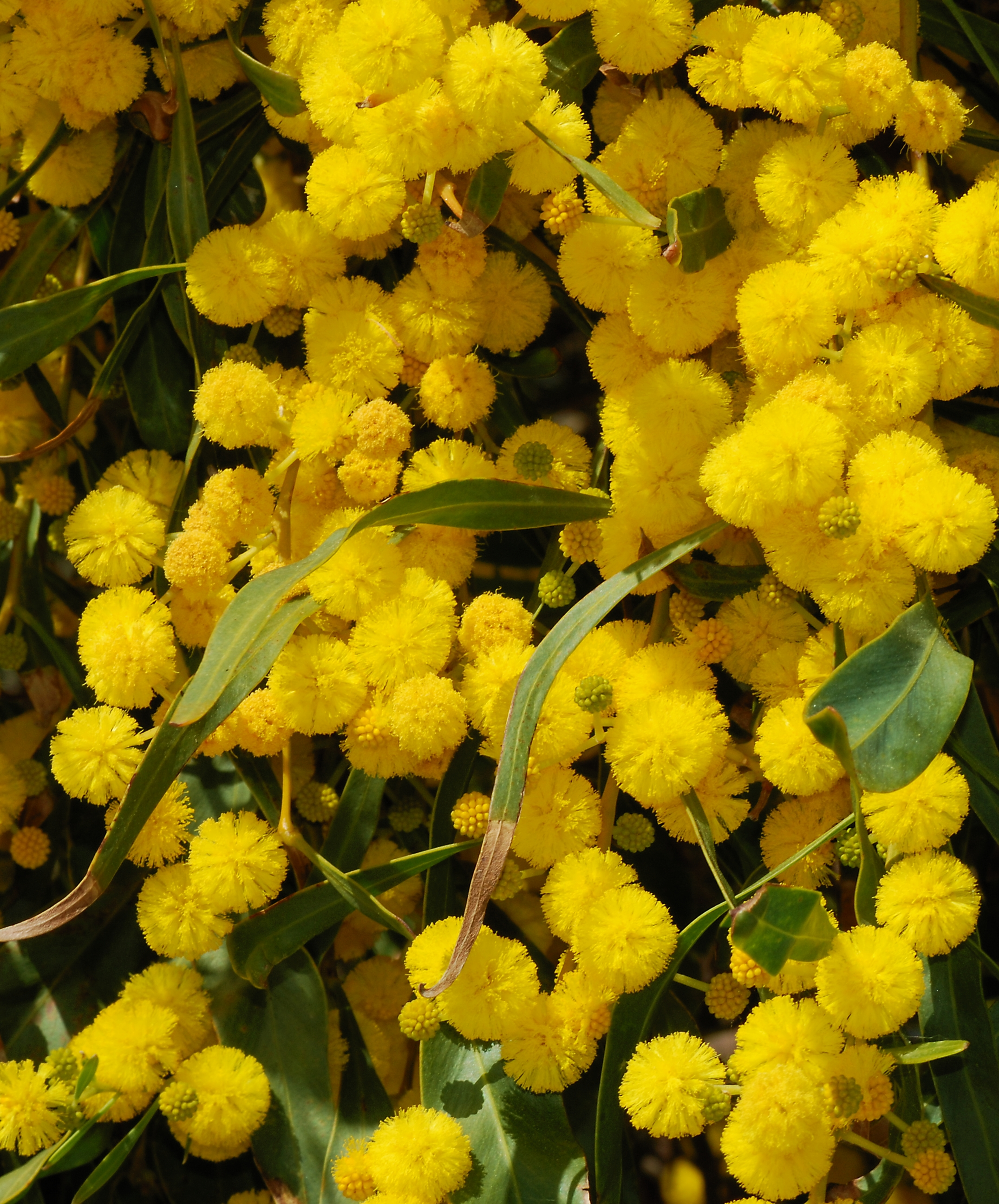 Acacia cyanophylla = Acacia saligna